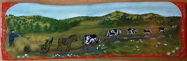 Tableau Poya "Le Dru". Auteur : Nathalie RENZACCI, Artiste Peintre : Poya de Vaches, Peinture Paysanne, Peinture pour enfants, Décoration d'Intérieur. Site Internet : ou Mail